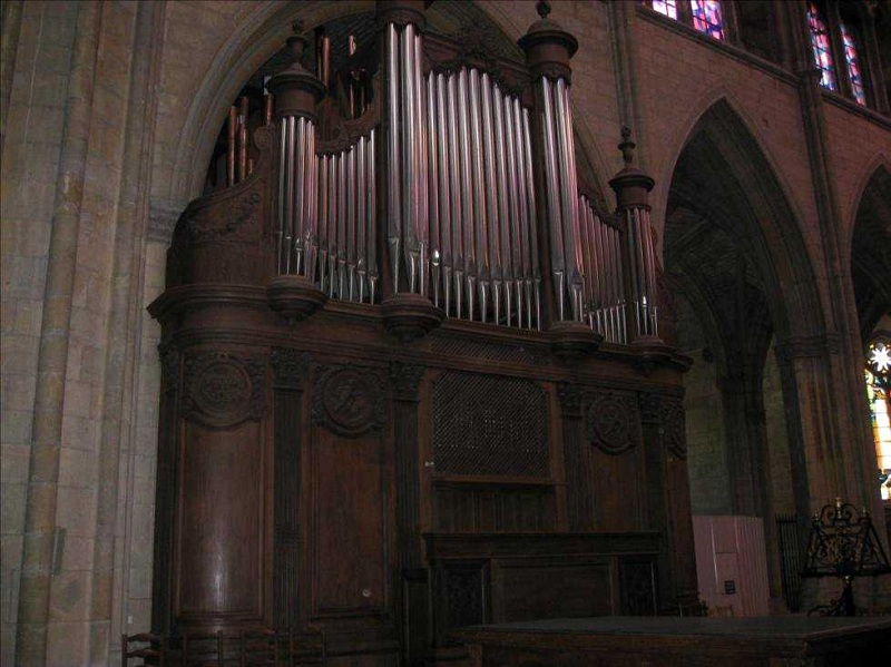 L'orgue de la cathédrale de Nevers dont le buffet est en partie constitué par remploi de certains panneaux des lambris surplombant les anciennes stalles.